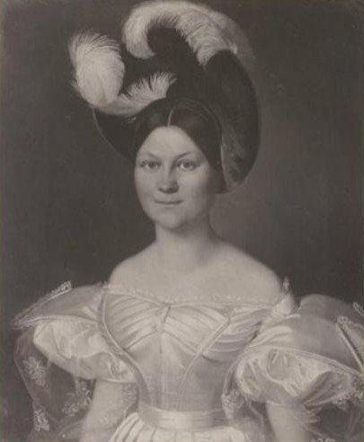 Ольга Михайловна Энгельгардт, ур. Кусовникова (1796—1853)